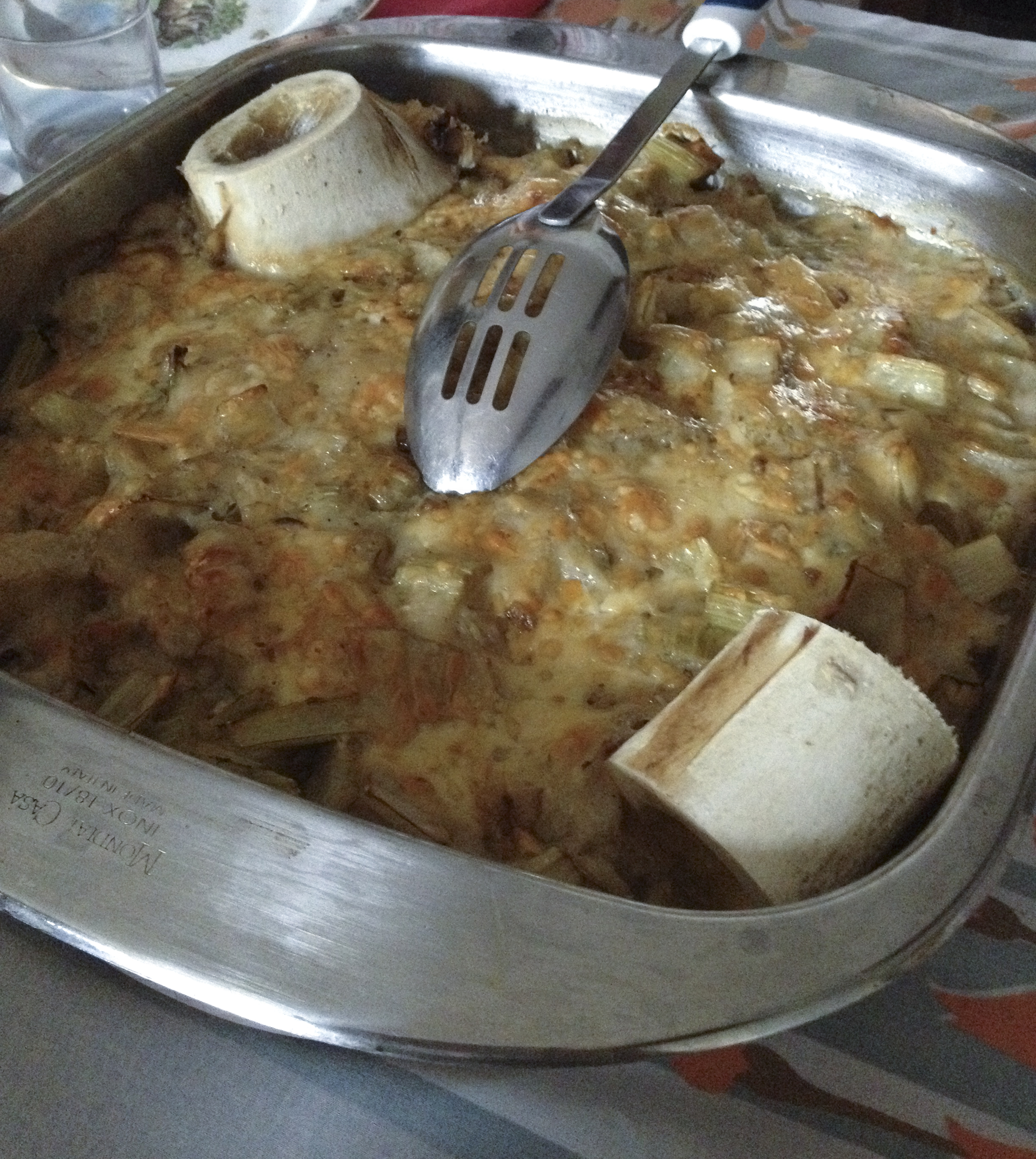 Gratin de cardons à la moelle, plat lyonnais.